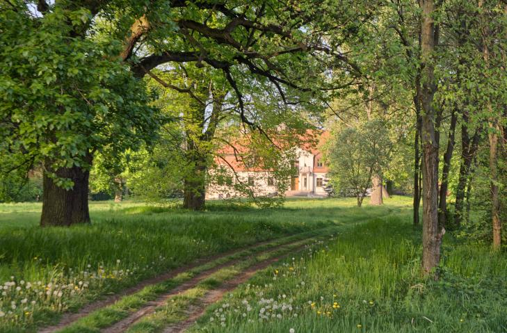 Góra - zespół dworski Broel-Platerów